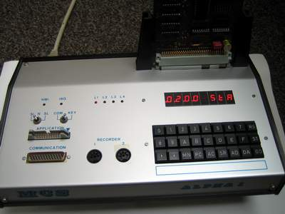 Alpha-1 MCS Berlin